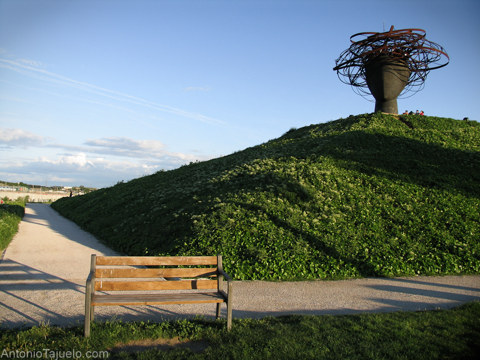 Atardecer en la Cabeza de Ariadna No voy a añadir más comentarios al resto del post. Te dejo solo con los últimos rayos del sol, al atardecer, desde este lugar. Puedes ver la entrada completa en